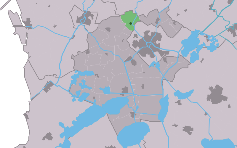 Kaartsje fan himrik fan Turns